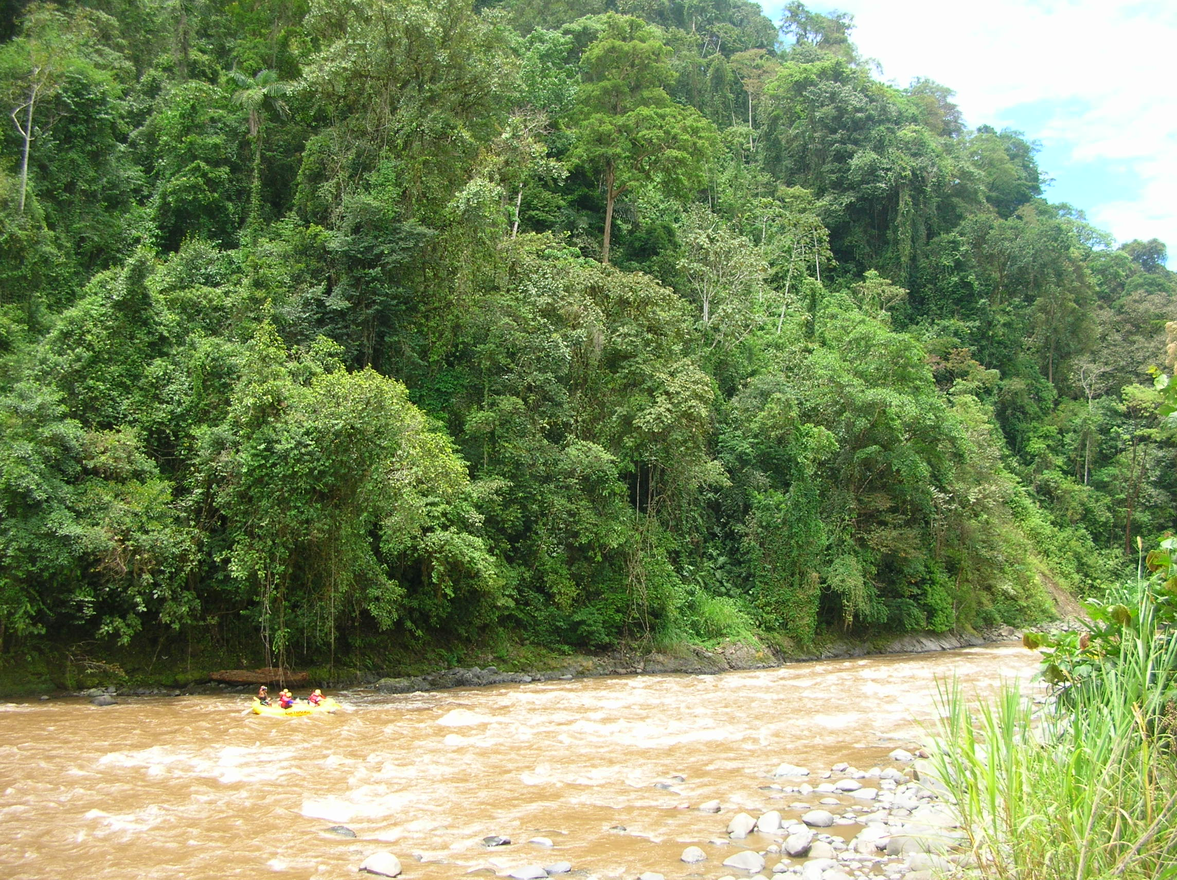 Le Rio Pacuare, au Costa Rica